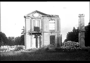 Carte postale du chateau d'Estouilly près de Ham dans la Somme détruit en 1917 par un bonbardement lors de la première guerre mondiale. Dans ce chateau vécu au XXIIIème siècle l'académlicien Charles-Marie de La Condamine après avoir épousé sa nièce Marie-Charlotte Bouzier d'Estouilly en 1756.